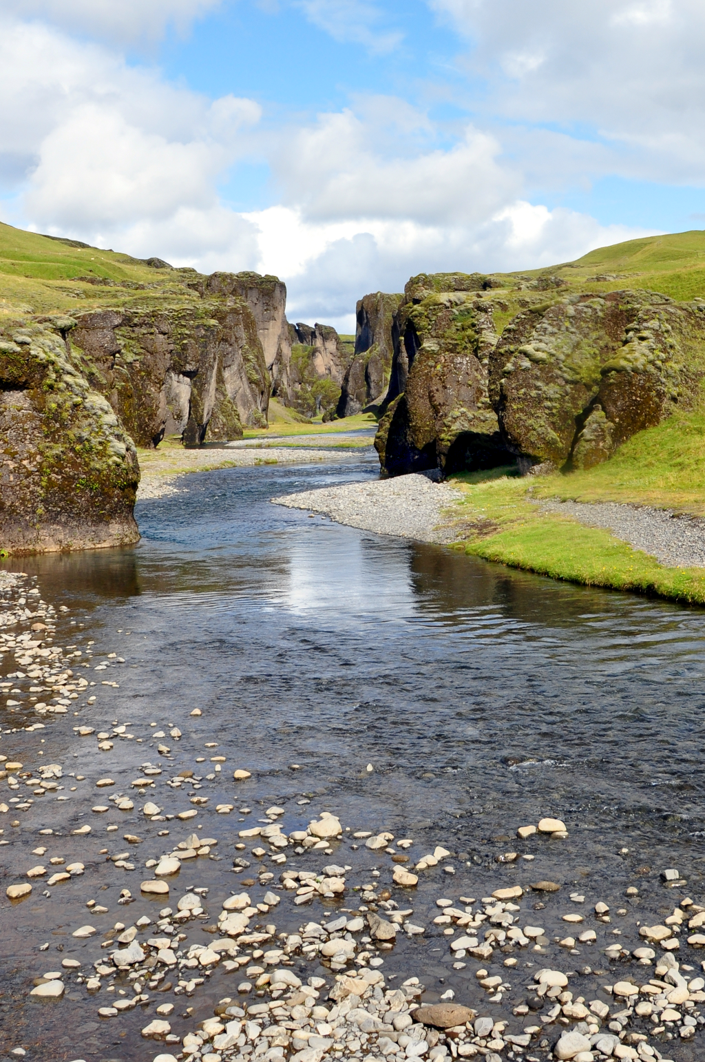 Canyon in Island - Fjaðrárgljúfur